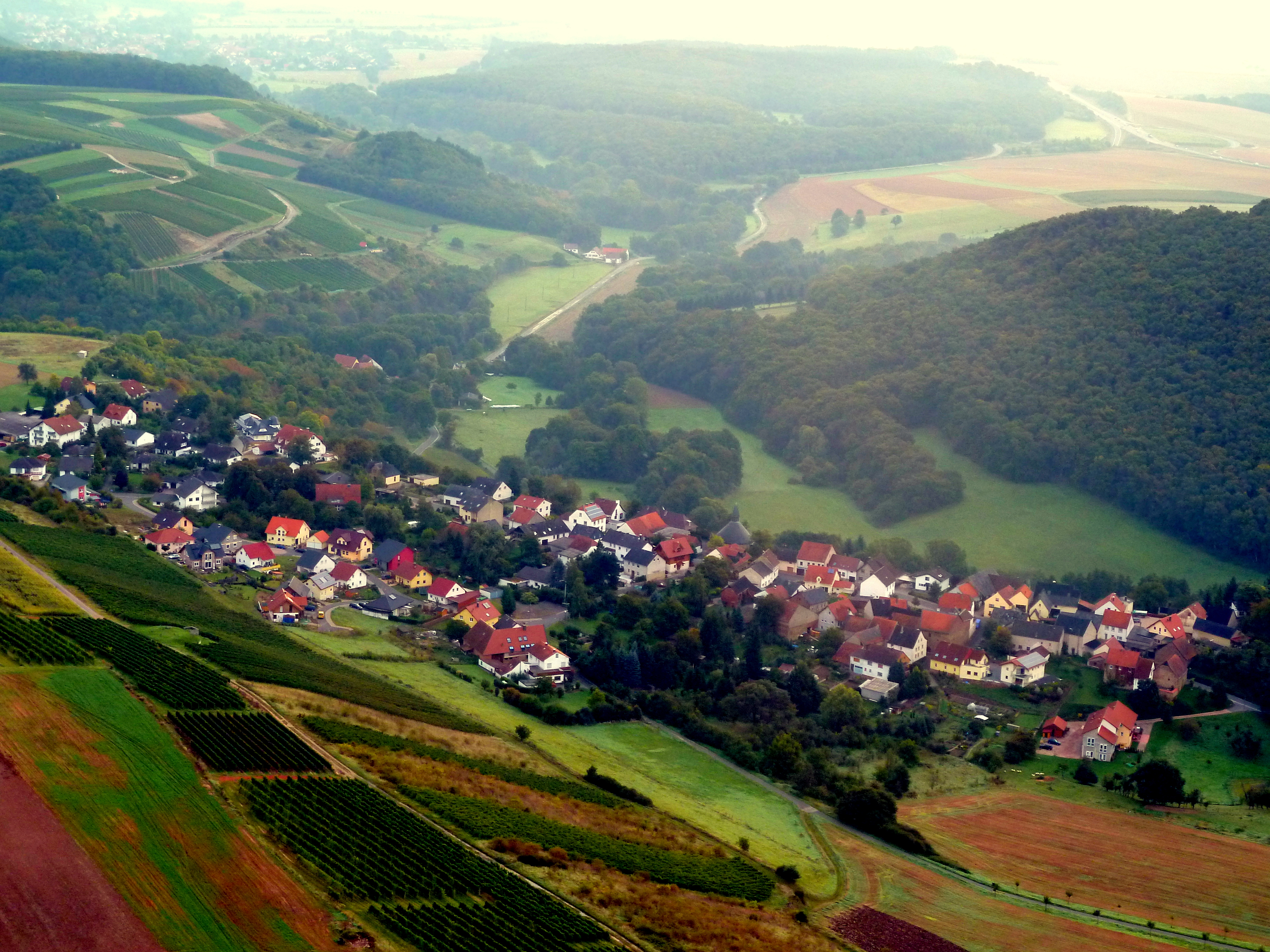 Burgsponheim